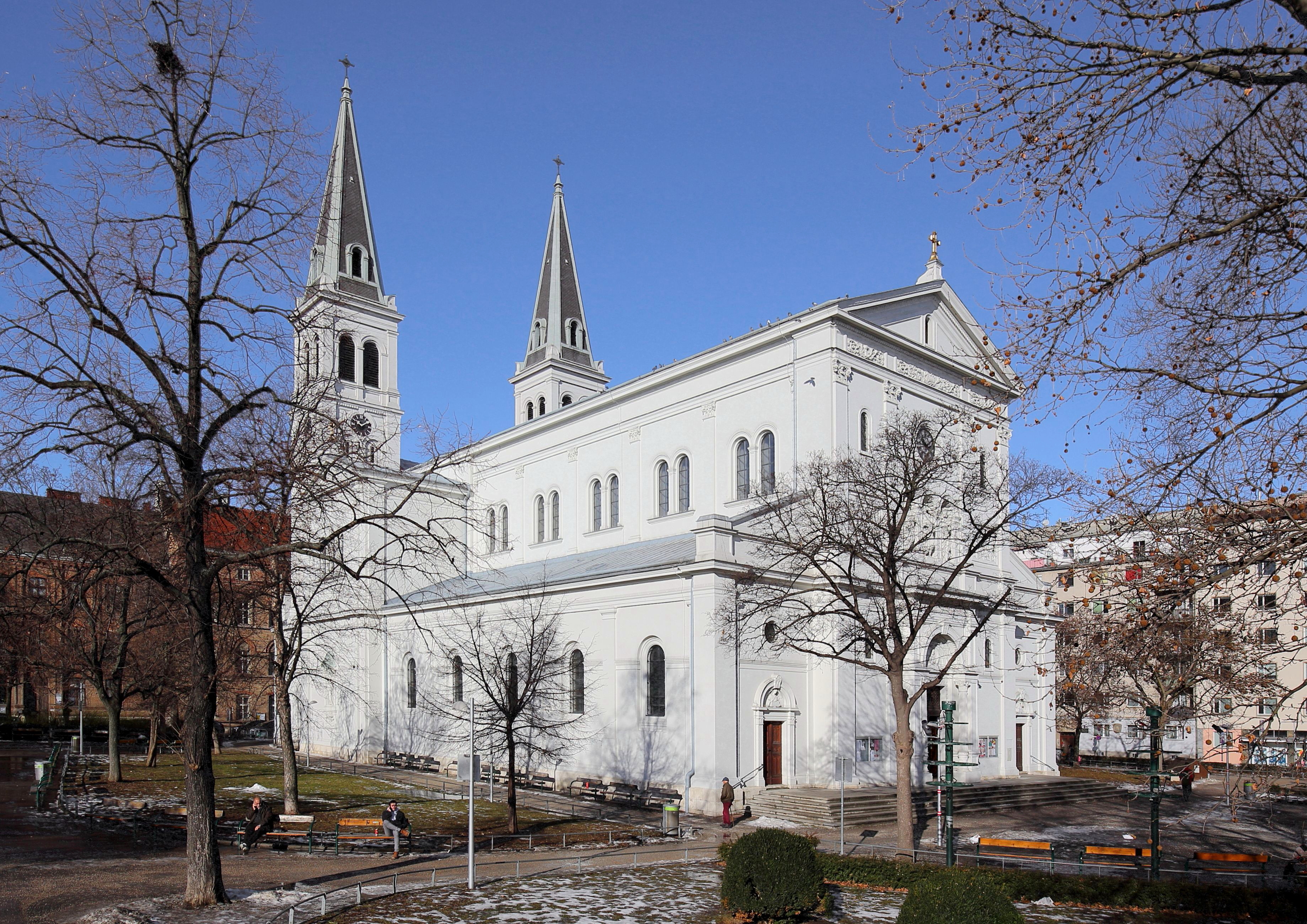 Südostansicht der röm.-kath. Pfarrkirche St. Johann der Evangelist, umgangssprachlich Keplerkirche genannt, im 10. Wiener Bezirk Favoriten. Die Kirche mit zwei quadratischen Türmen wurde von 1872 bis 1876 nach Plänen von Hermann Bergmann im Stil der Neorenaissance erbaut.